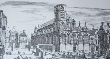 L'église Saint-Sauveur de Paris avant 1778, à l'angle de la rue Saint-Sauveur et de la rue Saint-Denis. L'entrée principale se trouvait alors à l'opposé.